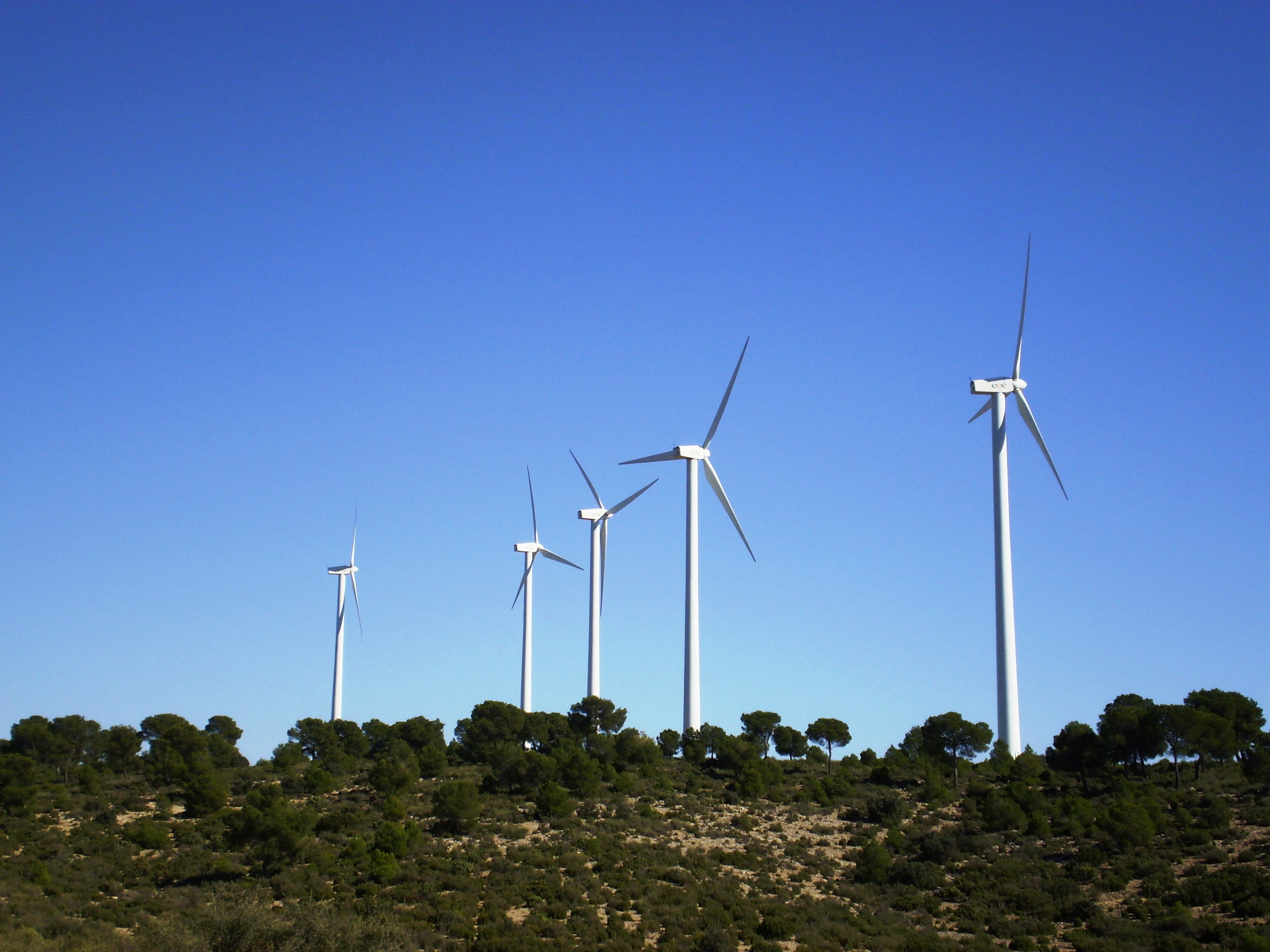 Chinchilla de Montearagón, Albacete, Castilla-La Mancha, Spain. Parque eólico.